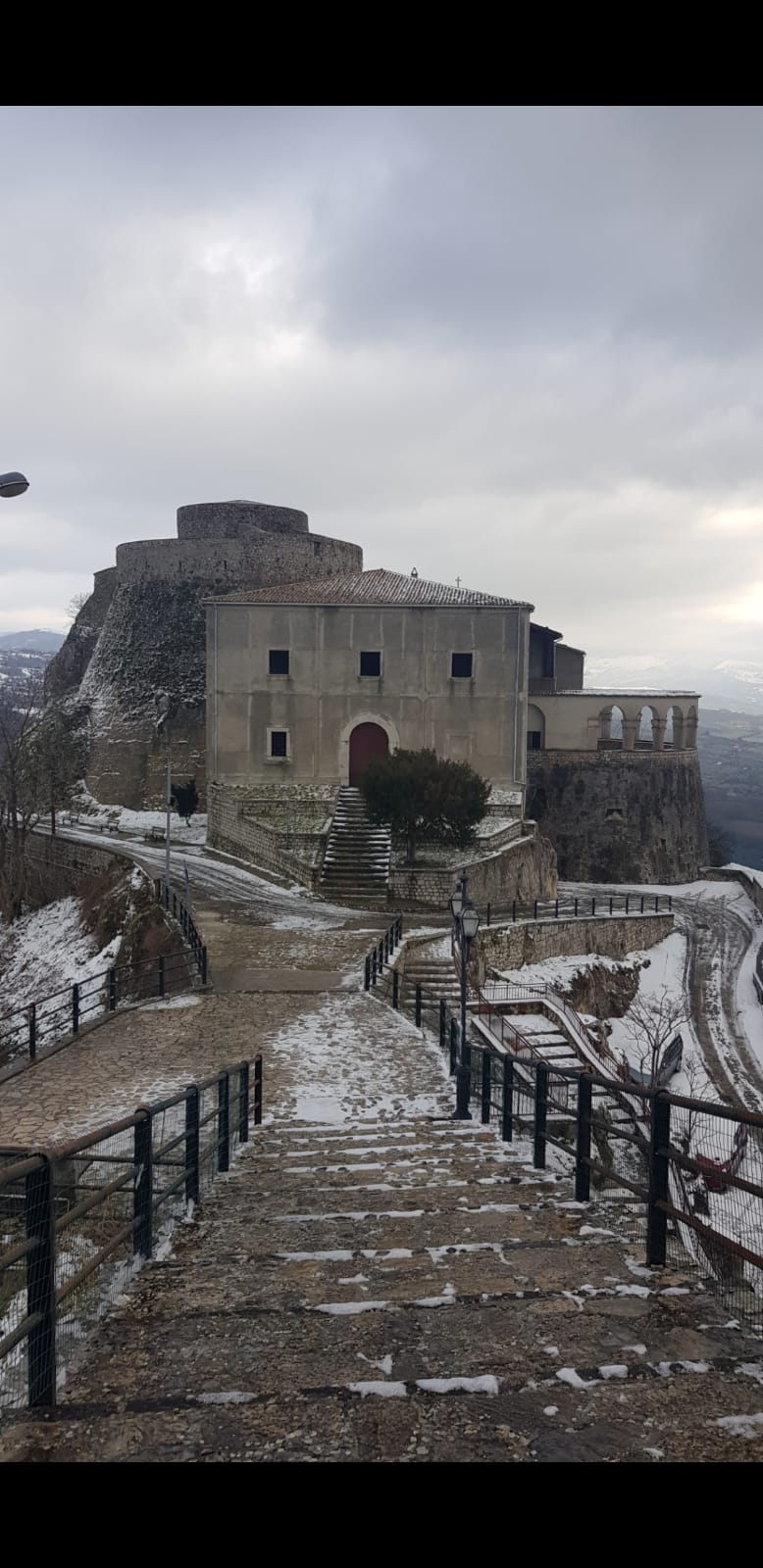 veduta entarat